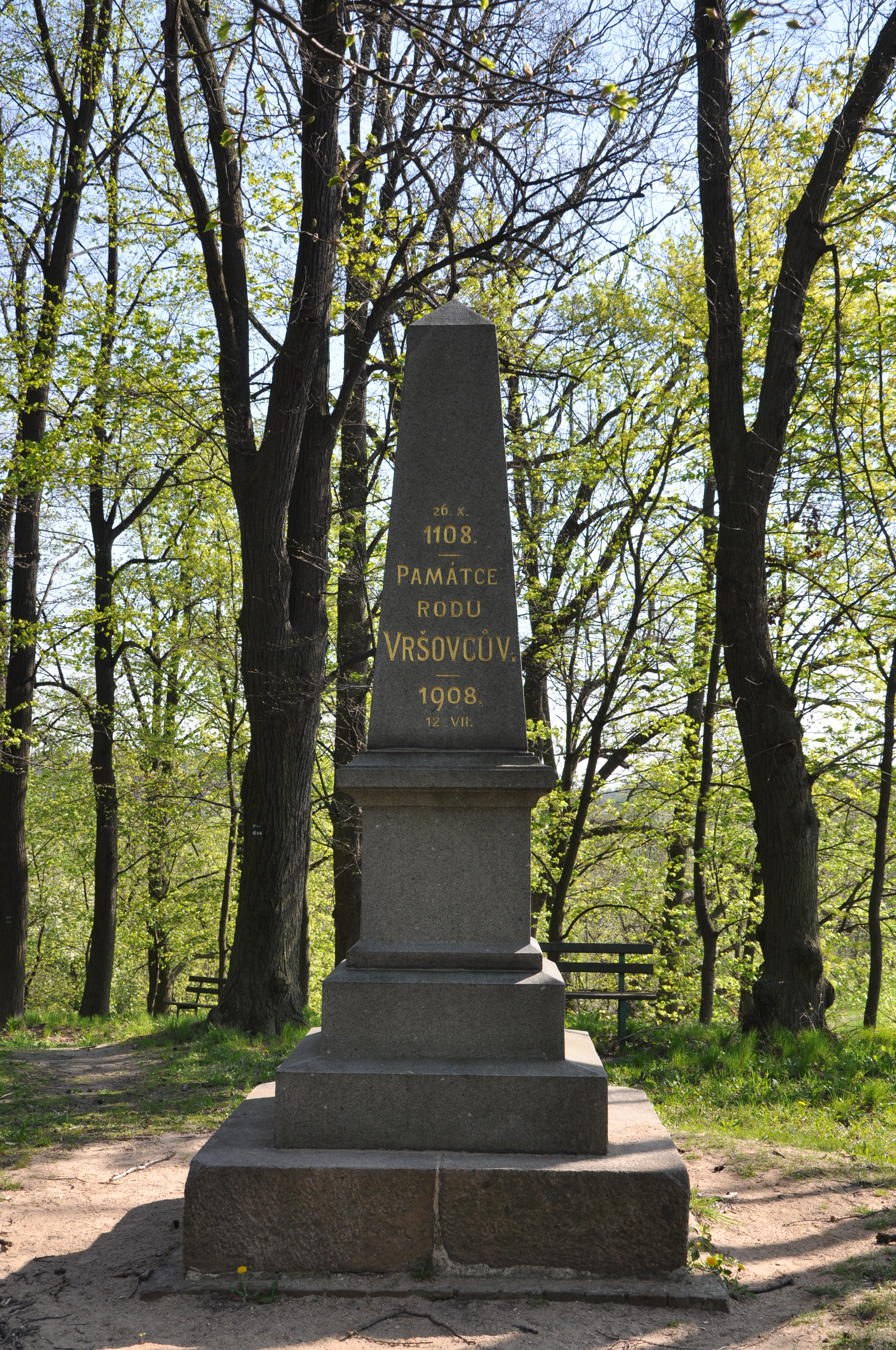 Vraclav, pomník k 800. výročí vyvraždění rodu Vršovců.